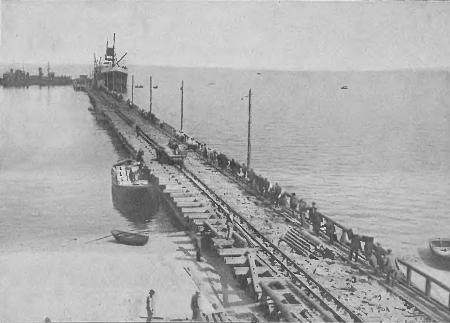 SS Kentucky to francuski niewielki parowy statek pasażerski o tonażu 7000 ton. Pierwszy pełnomorski statek zagraniczny jaki przybył do portu Gdynia.